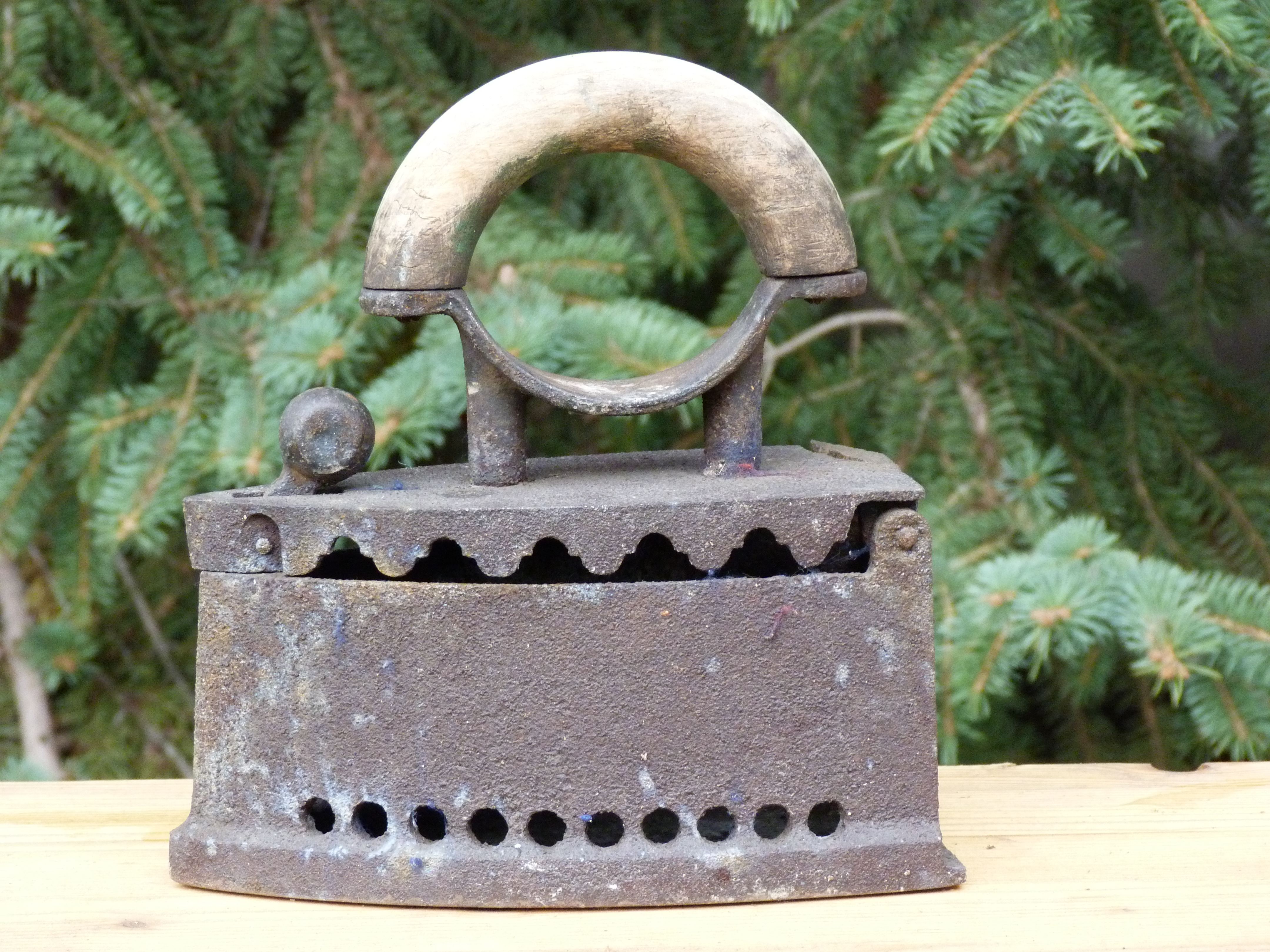 A felvétel 2014. február 23 -án készült. Szénvasaló.